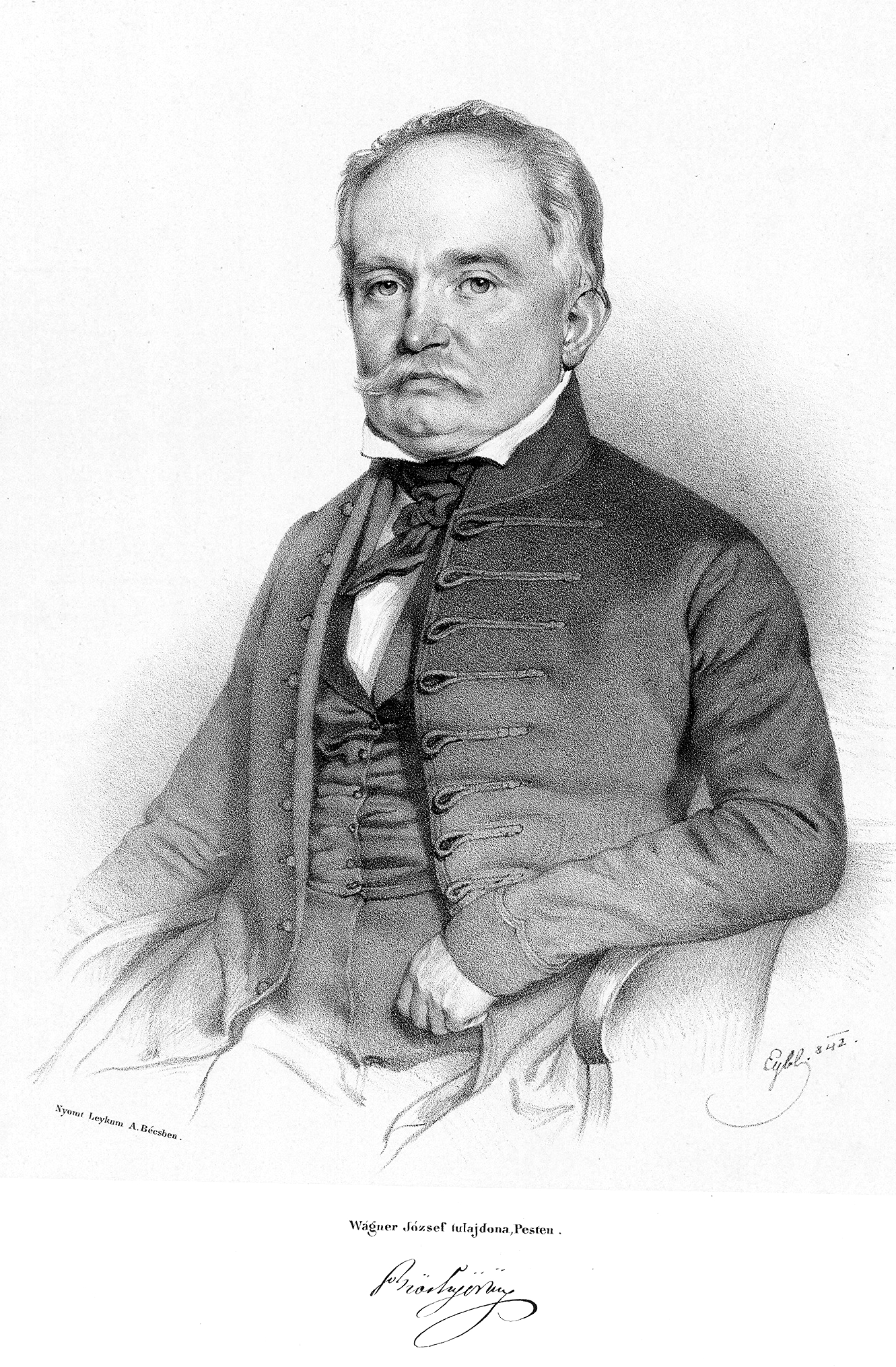 essenyői Beöthy Ödön (Nagyvárad, 1796. december 2. – Hamburg, 1854. december 7.) magyar politikus és országgyűlési követ, Bihar vármegye főispánja. Beöthy Ákos politikus apja.